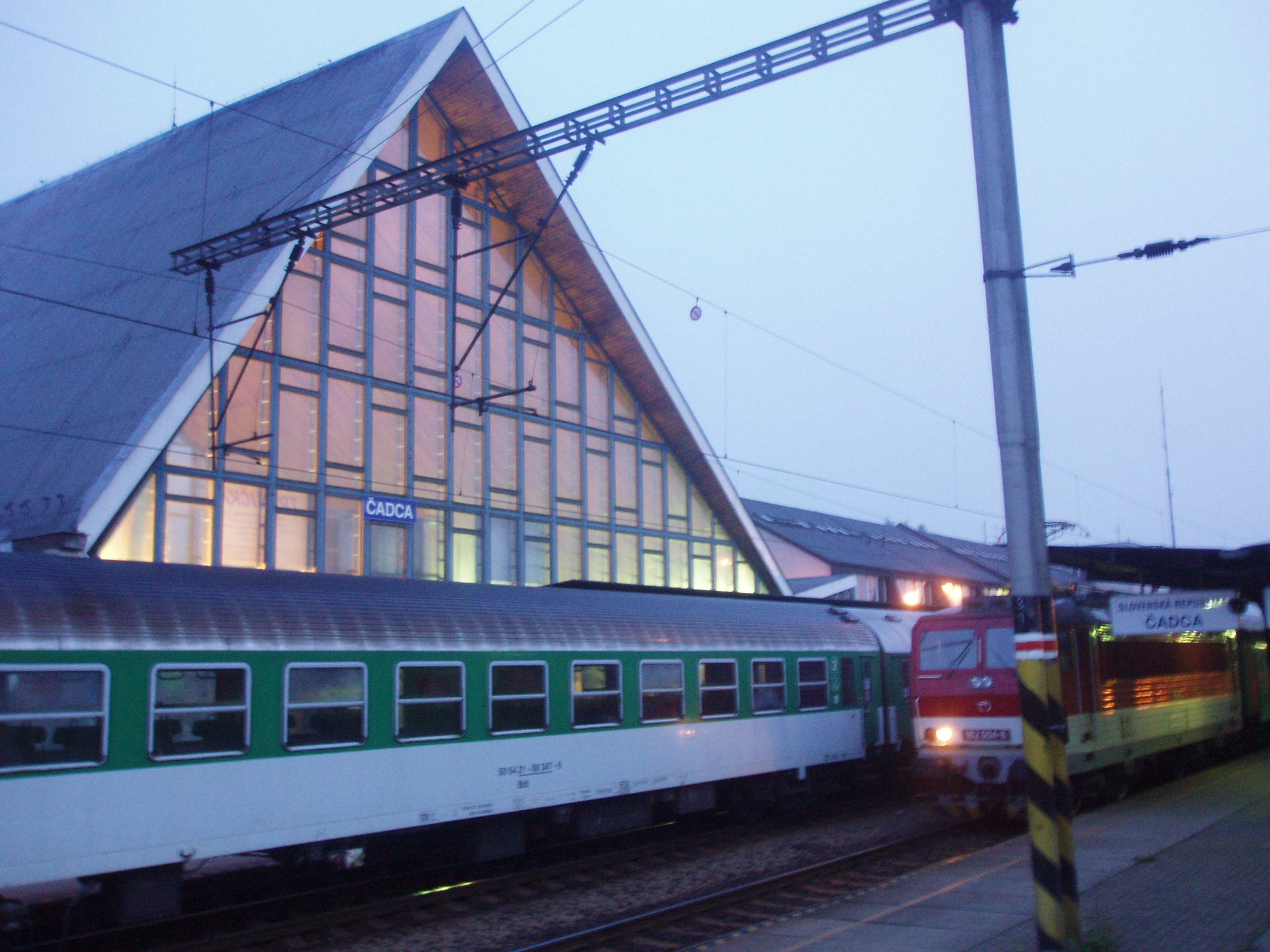 Gare de Čadca (SK)